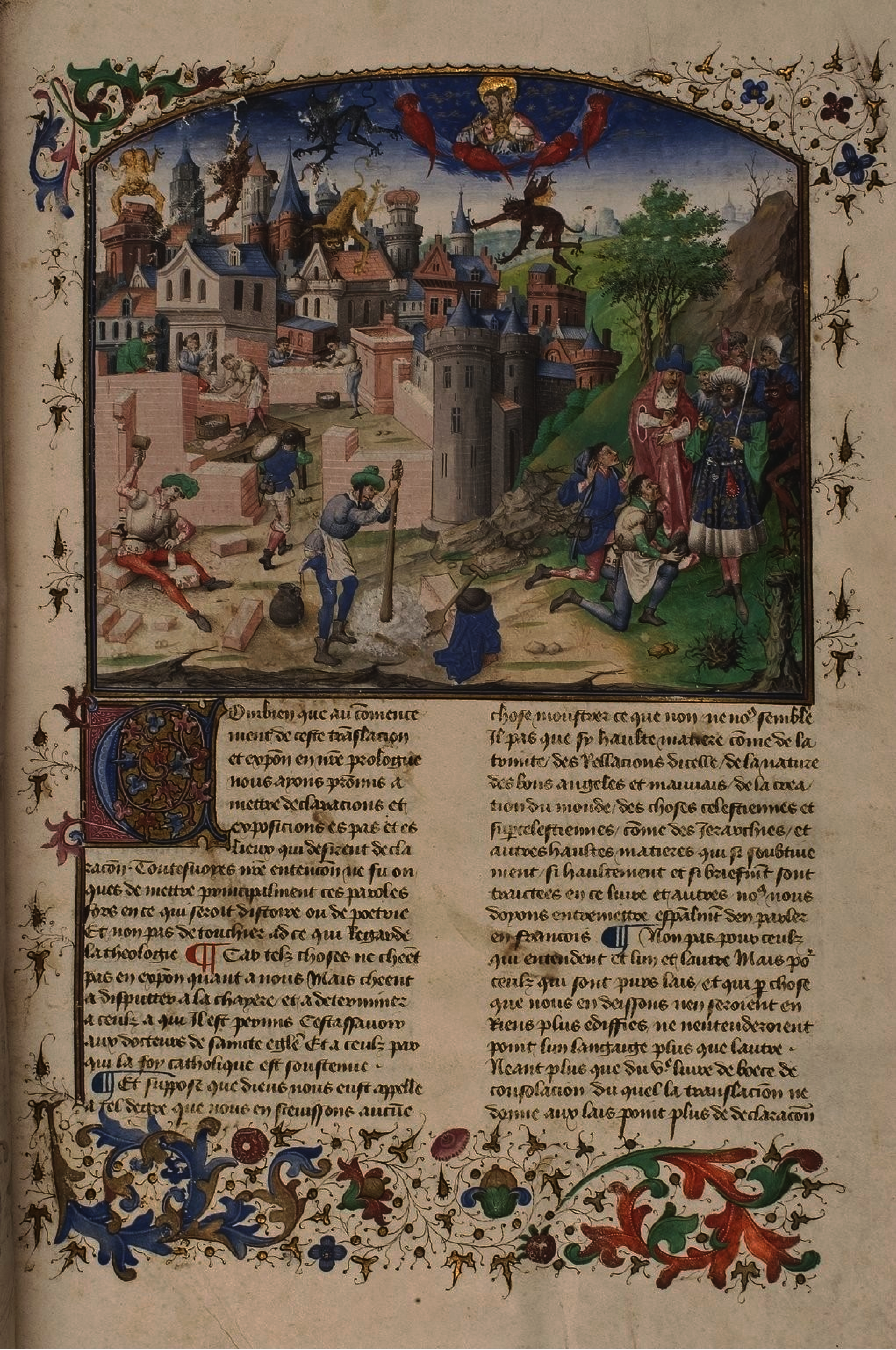 La Cité de Dieu de saint Augustin, traduite en français par Raoul de Presles, 1375. Première page illustrée.